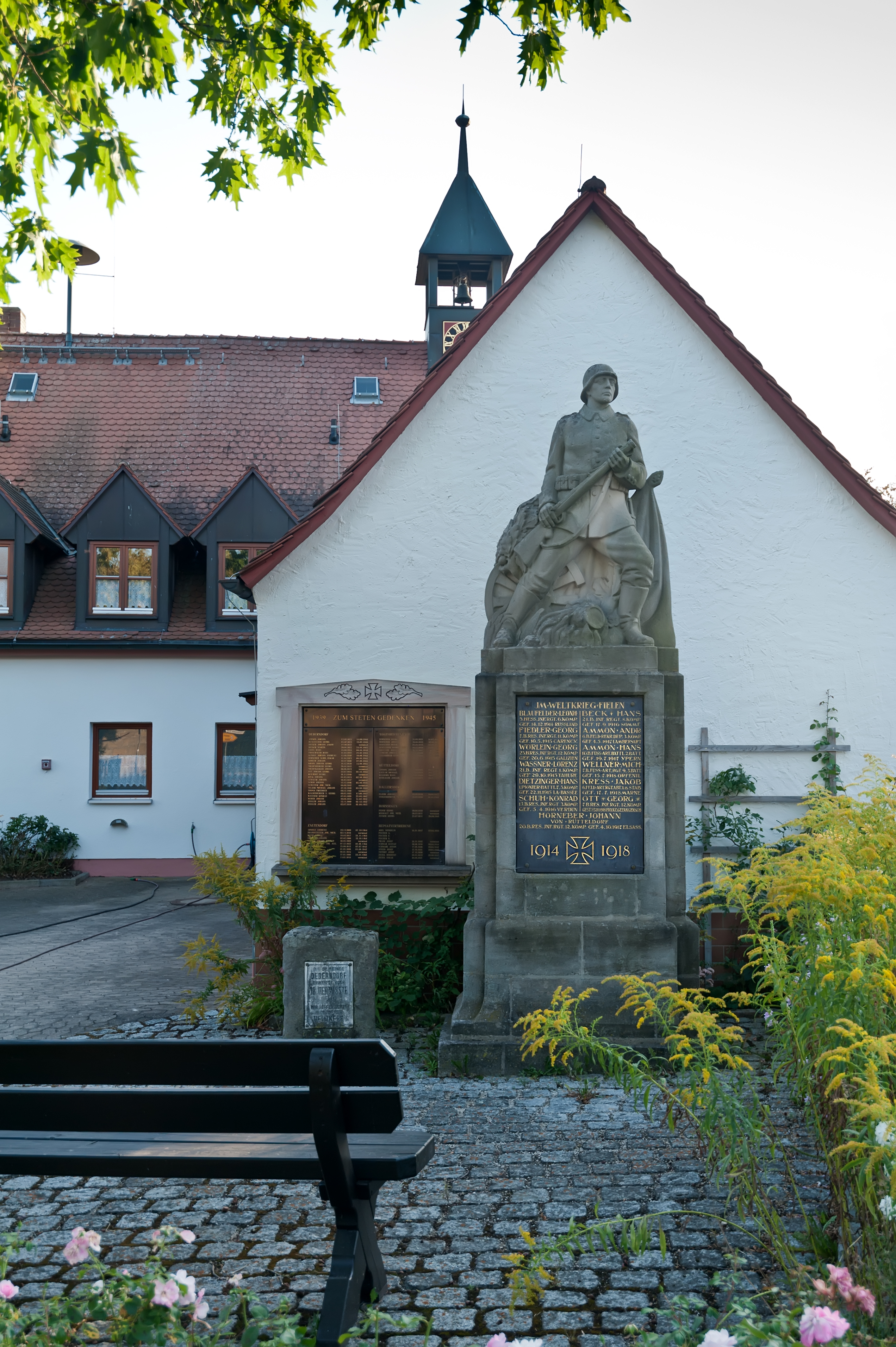 Kriegerdenkmal in Deberndorf (Cadolzburger Umgebung) mit Ruhemöglichkeit